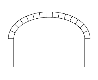 Korbbogen